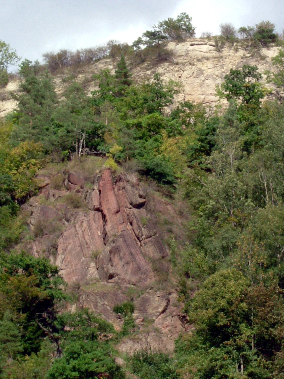 Nationales Geotop: Bohlenwand: Transgression von Zechstein (hell) über gefalteten devonischen Gesteinen; NSG Nr. 160 Bohlen WDPA ID 162484)